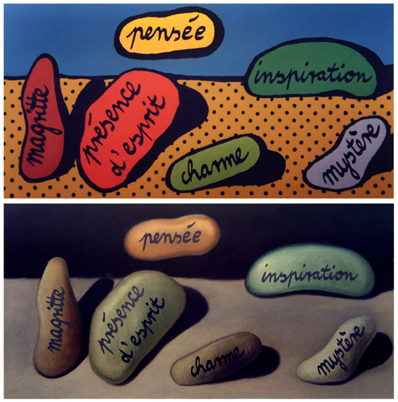 Hans-Peter Klie: Kunsttheorie. 1985. Öl und Acryl auf Nessel